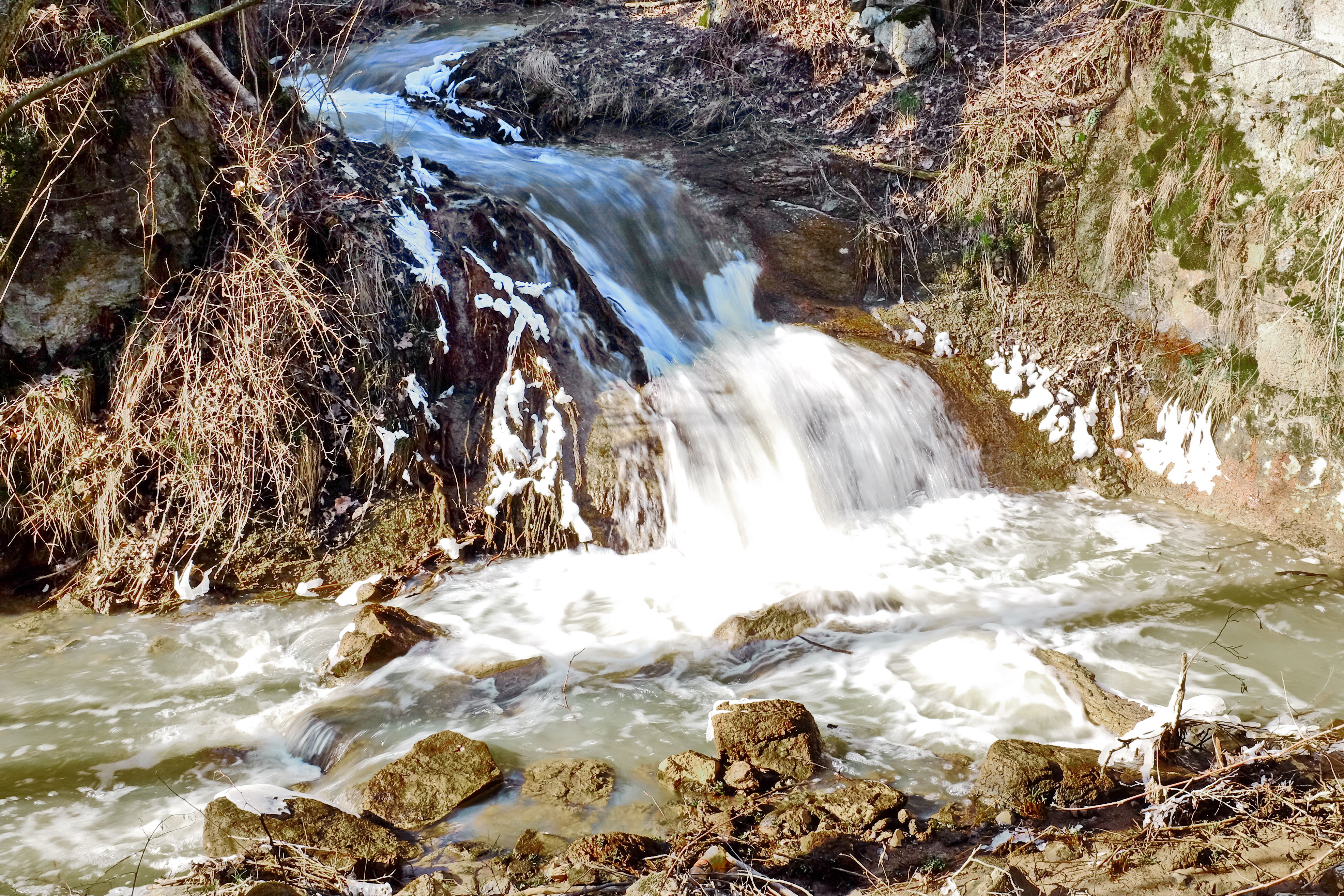 Jimlíkovský vodopád na Vlčím potoce, okres Karlovy Vary